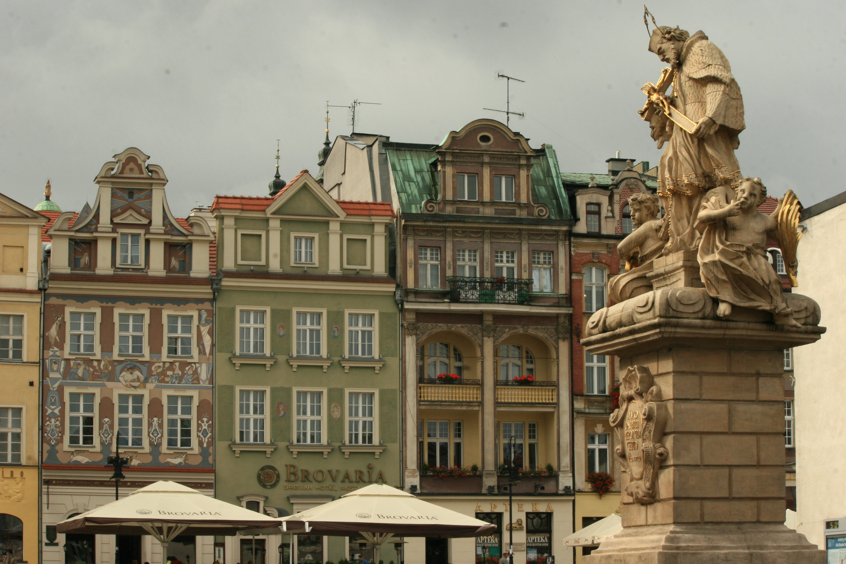 Poznań - zespół urbanistyczno-architektoniczny Starego Rynku wraz z kompleksem budynków jak ratusz, odwach, domki budnicze, pałac Działyńskich, kamienice obrzeżne oraz studnia Prozerpiny i figura św. Jana Nepomucena (zabytek nr A 195)